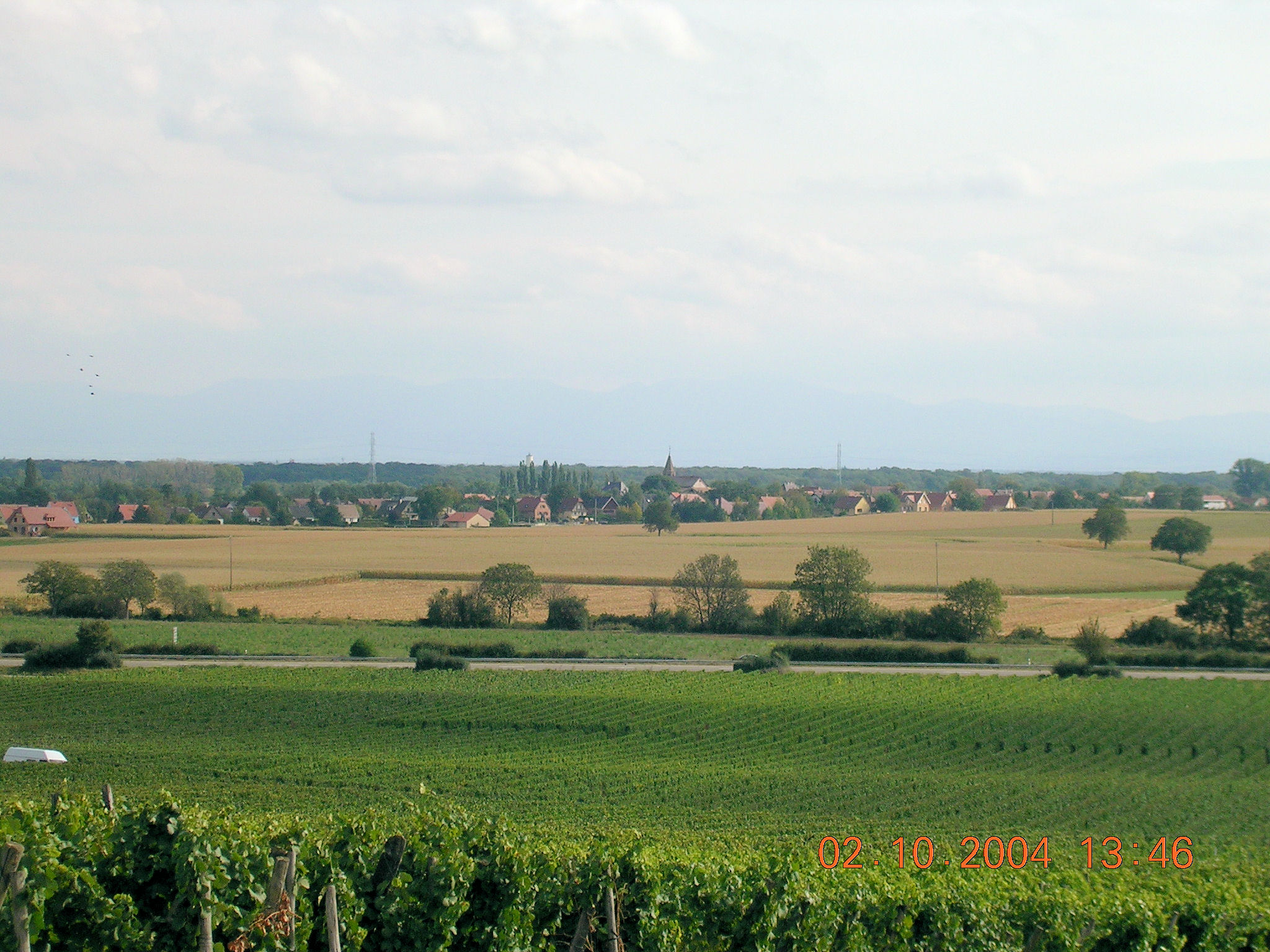 Gundolsheim depuis le Bollenberg.